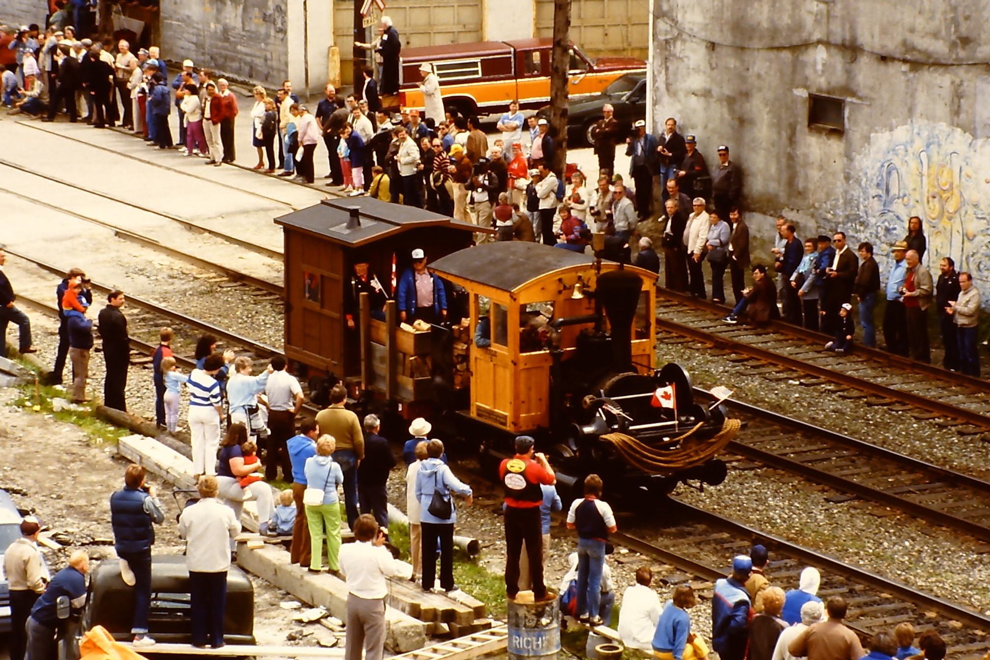 Dampflokomotive Falk Nummer 1 auf der SteamExpo 86 in Vancouver